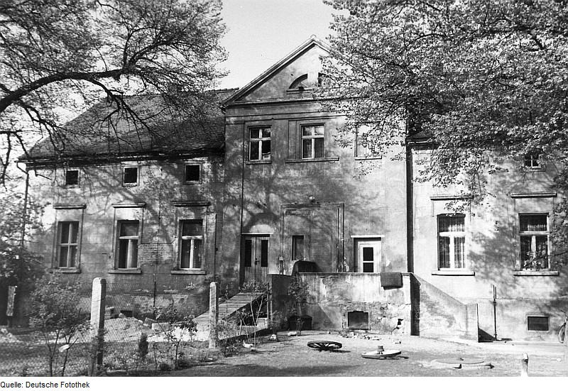 Original image description from the Deutsche Fotothek Lohsa-Steinitz mit Kolbitz. Sogenanntes Neues Schloß